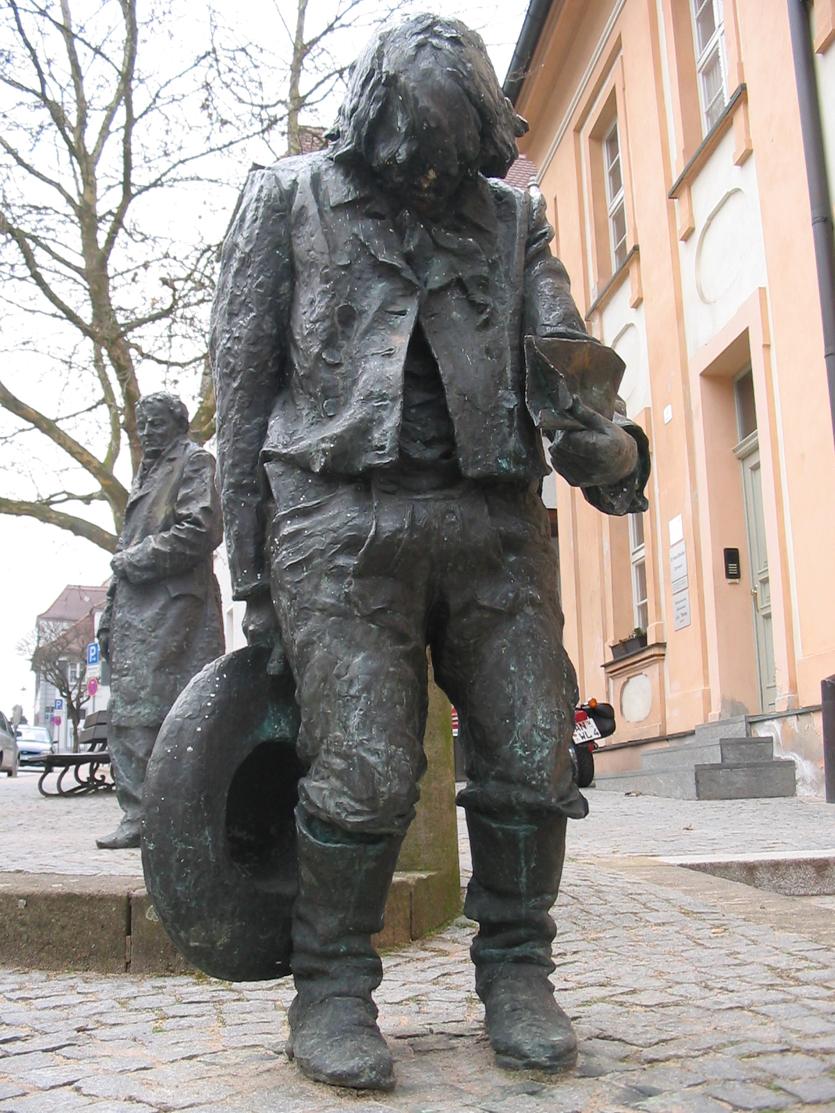 Das Denkmal wurde im Jahr 1981 in Ansbach (Bayern) errichtet und zeigt das "Kind von Europa". Hauser ist vordergründig als Findling (1828) dargestellt. Im Hintergrund ist Kaspar als Edelmann dargestellt.